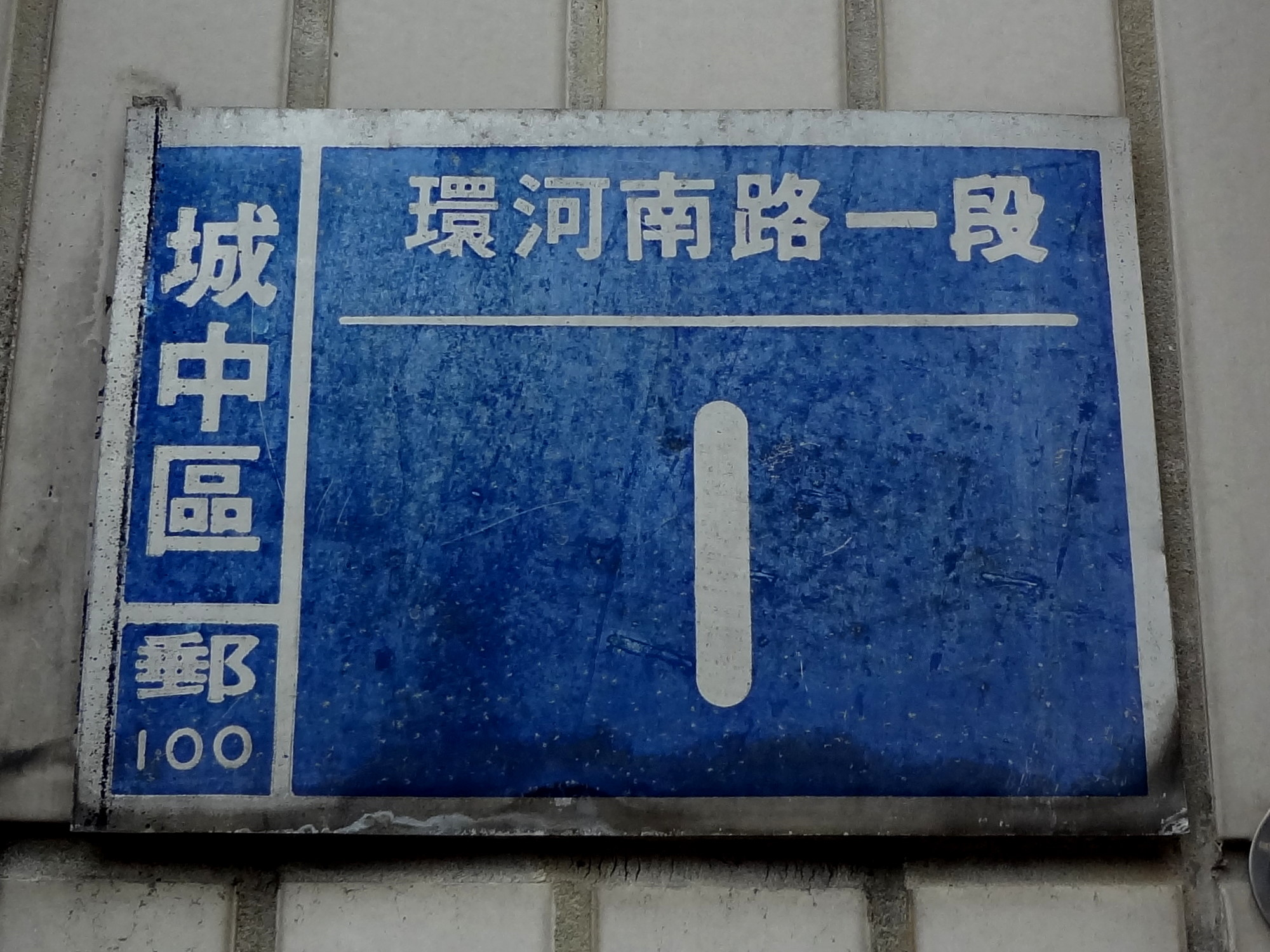 中文（台灣）: 臺北市城中區環河南路一段1號門牌，位於臺北市洛陽立體停車場（臺北市萬華區環河南路一段1號）1樓外牆。